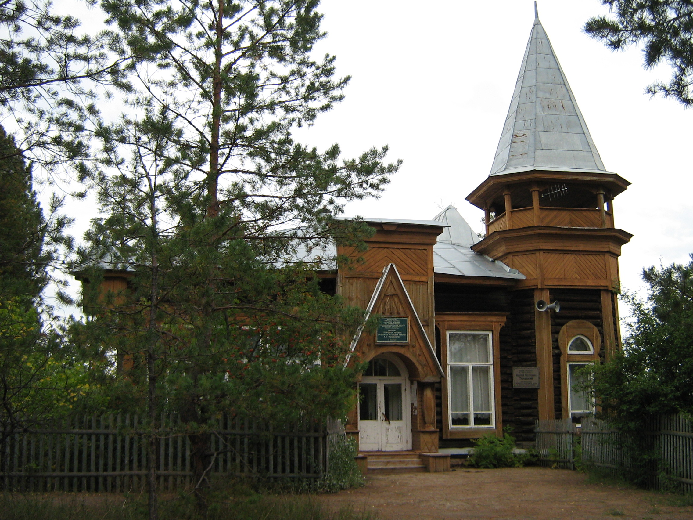 Боровая опытнаялесная станция